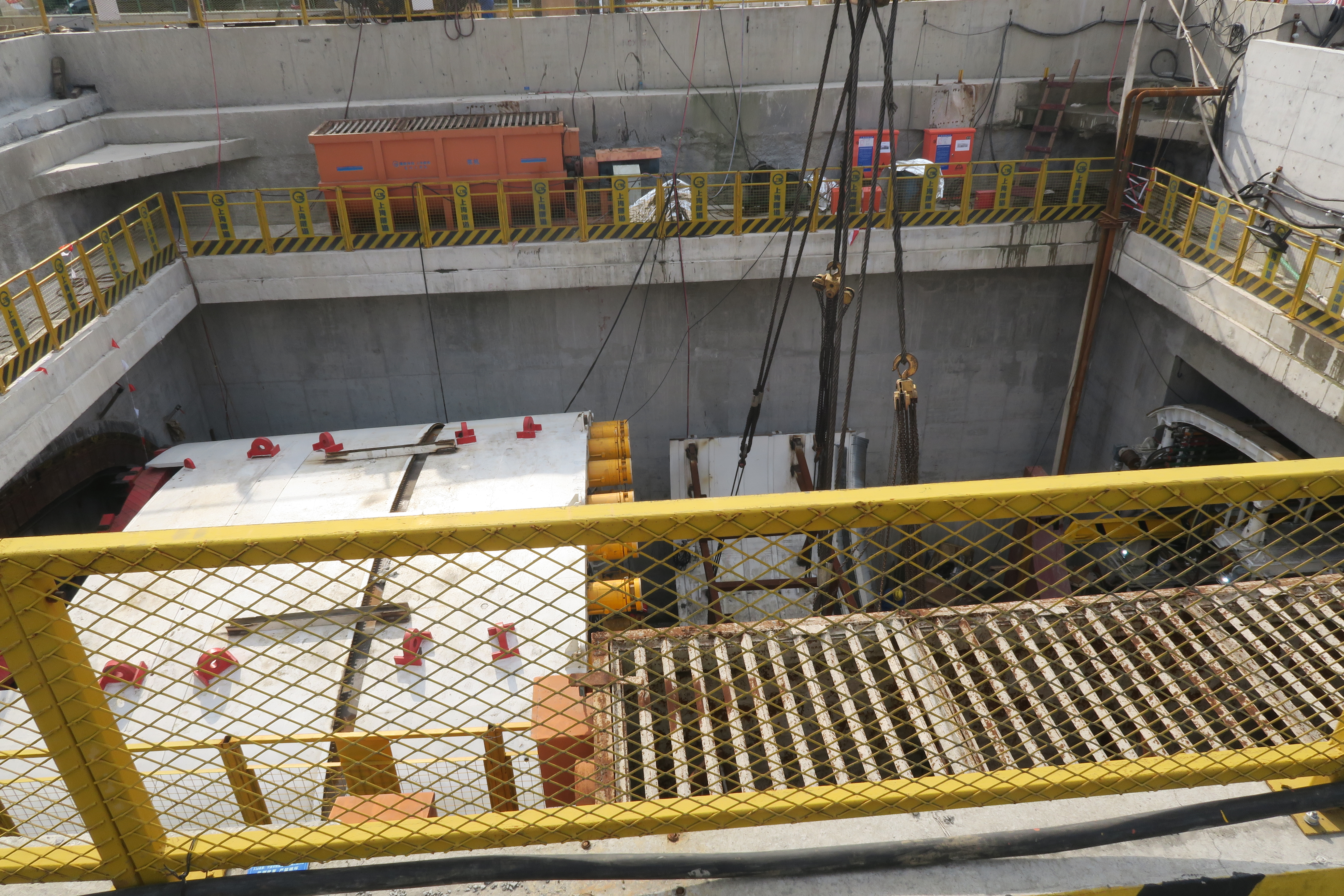 宁波轨道交通2号线二期过渡段盾构工地